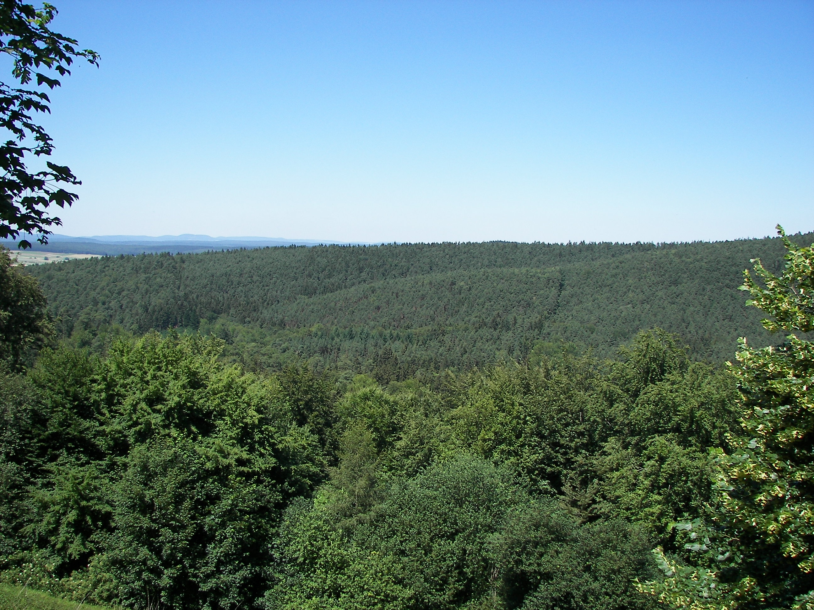 Burgwald, Gerhardsberg, vom Christenberg aus gesehen